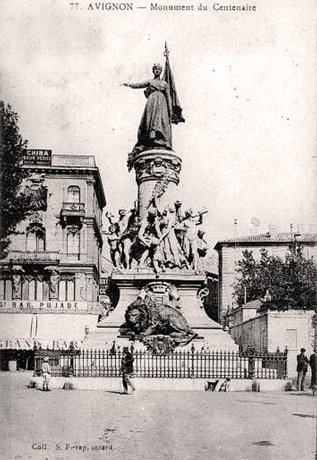 Monument du Centenaire du rattachement d'Avignon à la France érigé en 1893 actuellement sur les allées de l'Oulle